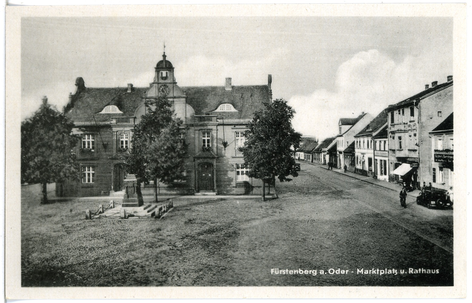 Fürstenberg / O.; Marktplatz und Rathaus This postcard is from publisher Brück & Sohn in Meißen ( postcard has a unique number 28383 and is available in a higher resolution at the publisher. This images was uploaded in a cooperation project between Wikipedians and the publisher.